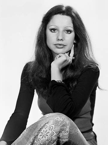 Szűcs Judith magyar énekesnő